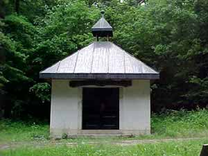 Chapelle de Saint Fromond, Bonfol, Jura Suisse